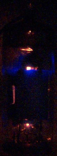 Blaue Lichterscheinung am Glaskolben einer PL95